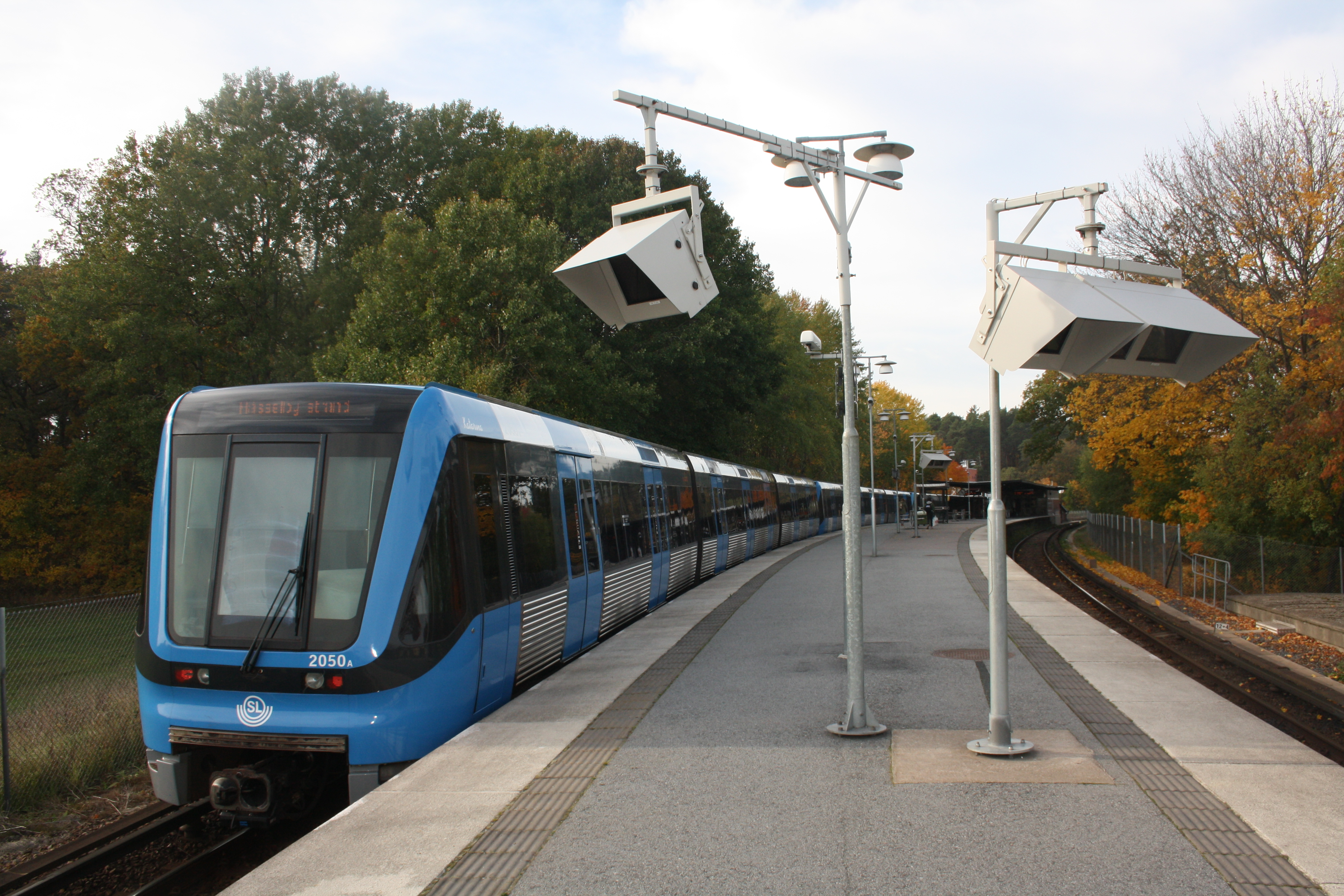 Ängbybyplan tunnelbana